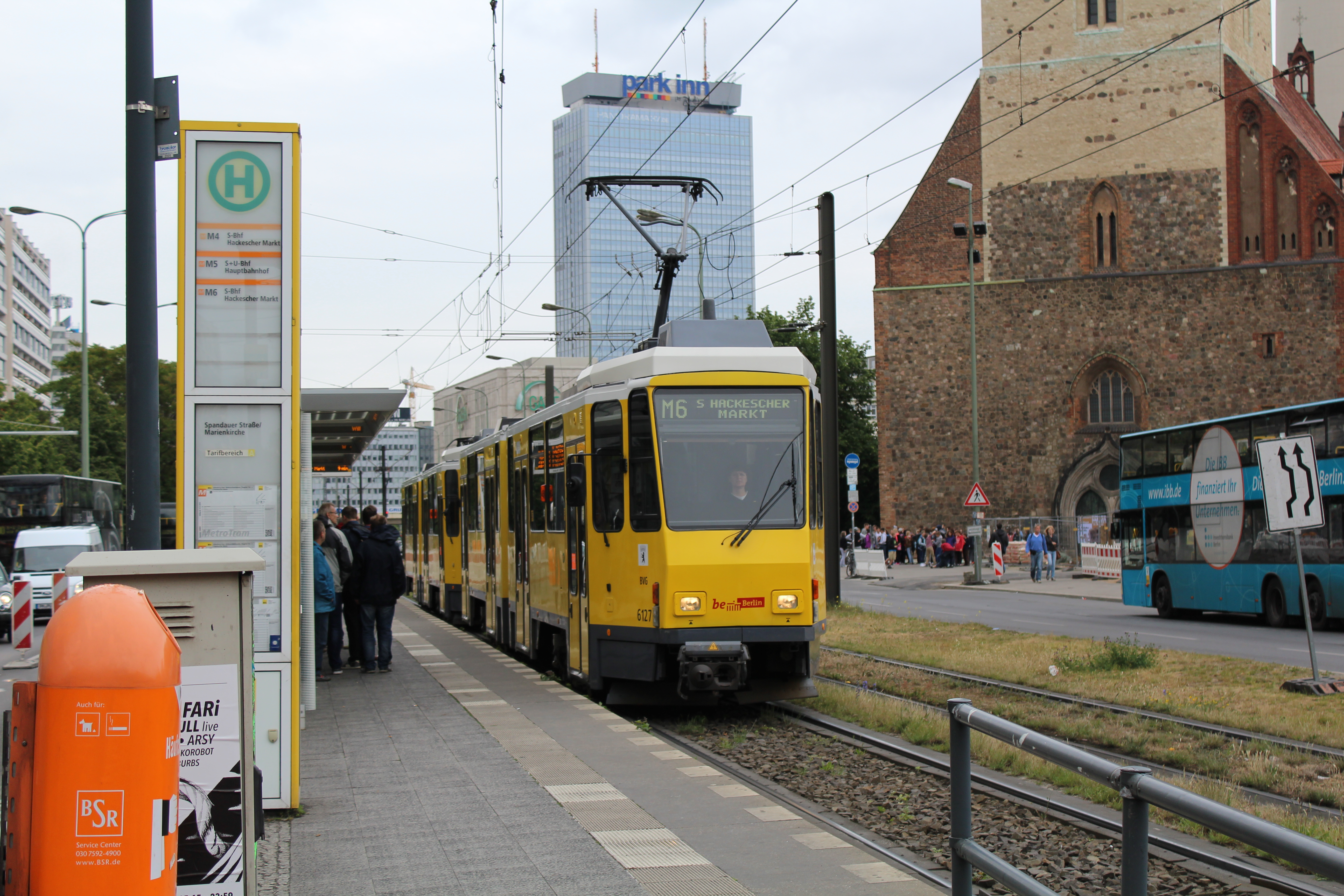 Linie M6 der Straßenbahn Berlin, 2015